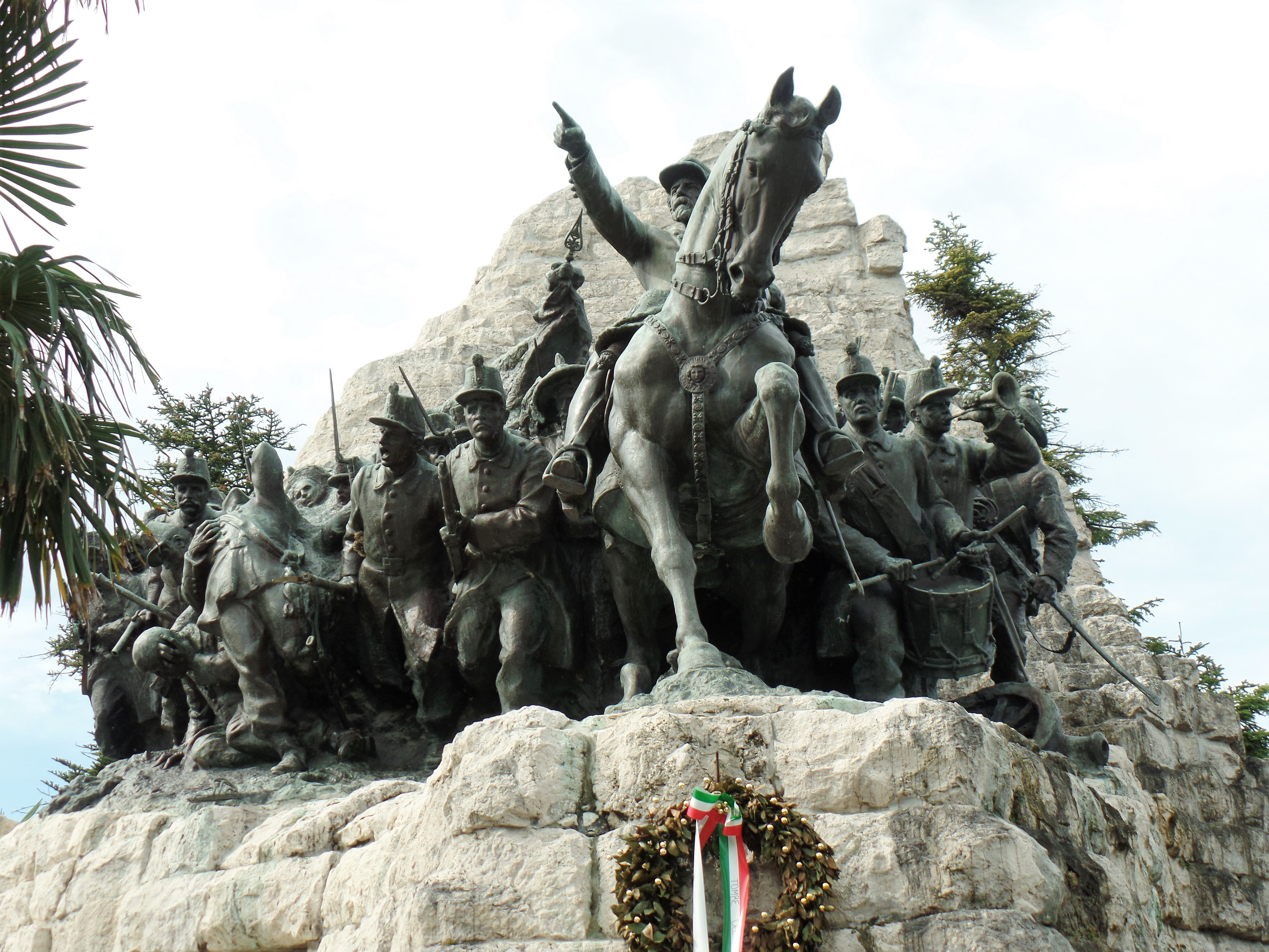 Castelfidardo monumento battaglia 1860